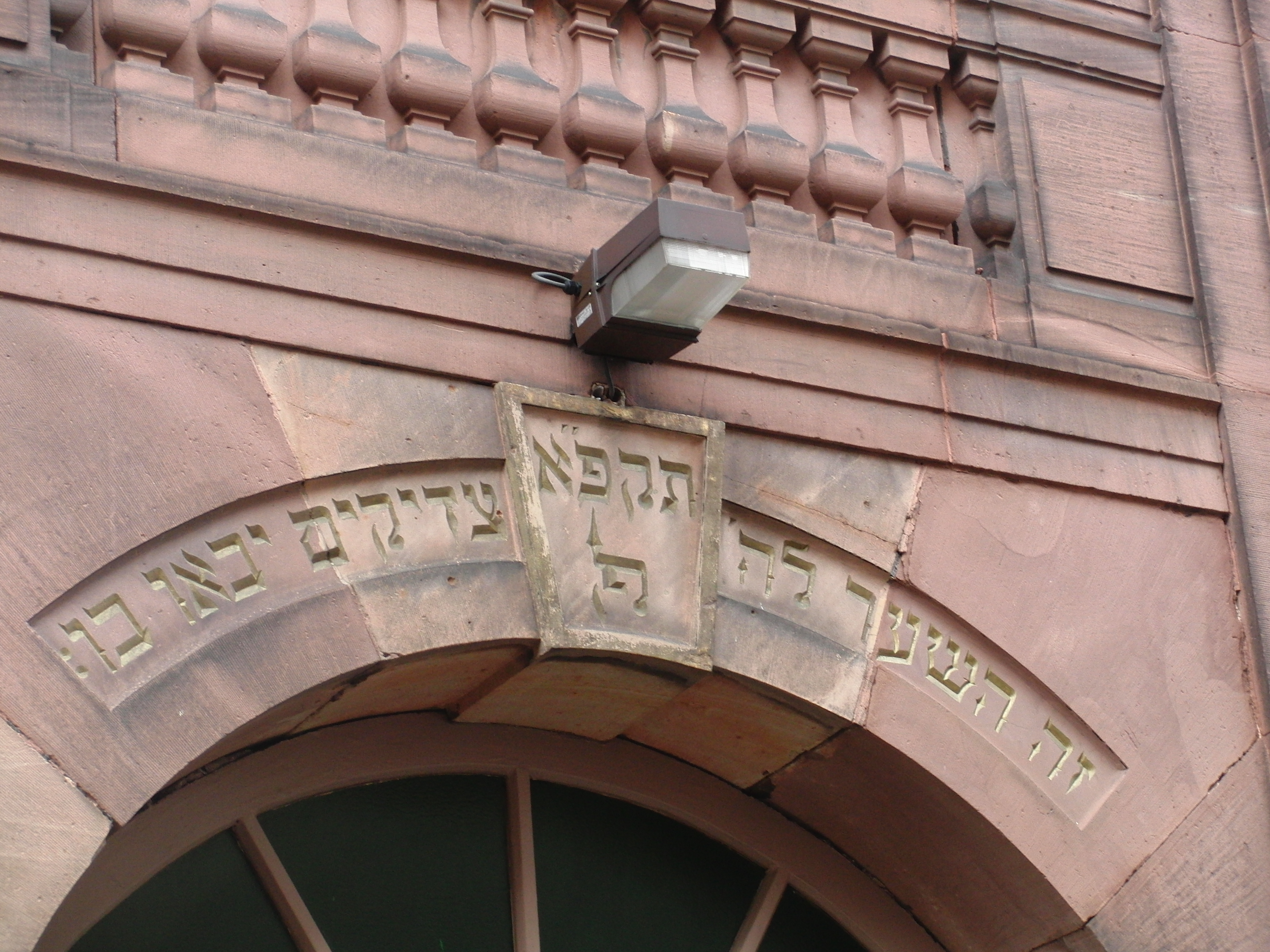 CIMG7913